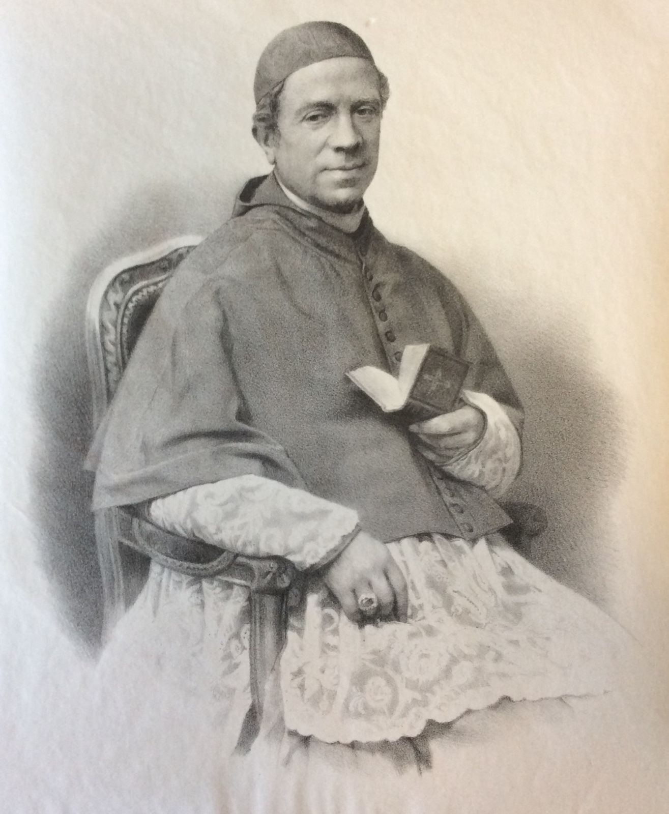 Lithographie du cardinal Quaglia (1871).